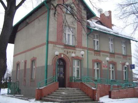 Pošta v Chałupkách, Polsko